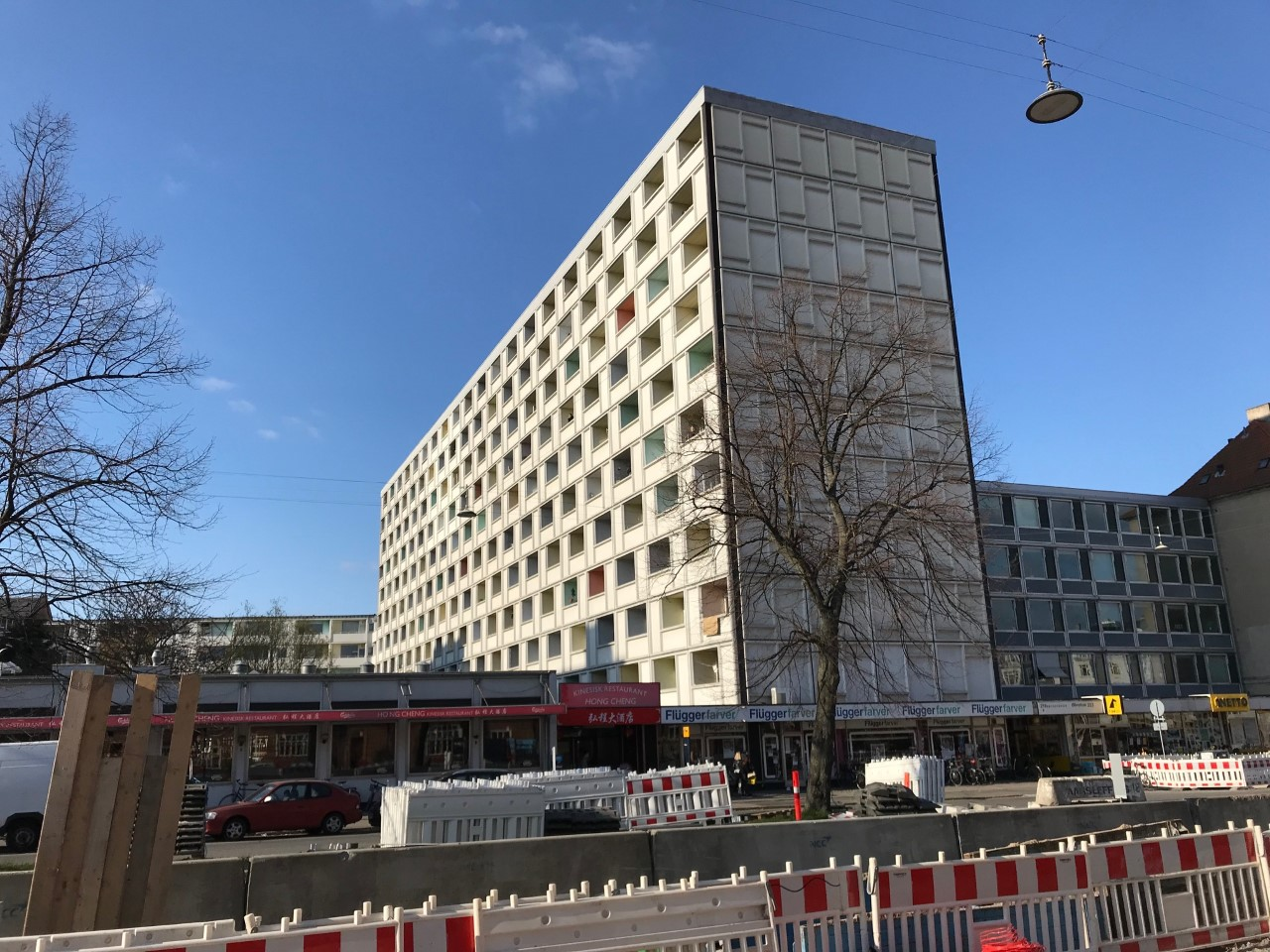 Øbrohus set fra Jagtvej. Fotograferet fra sydvest april 2019